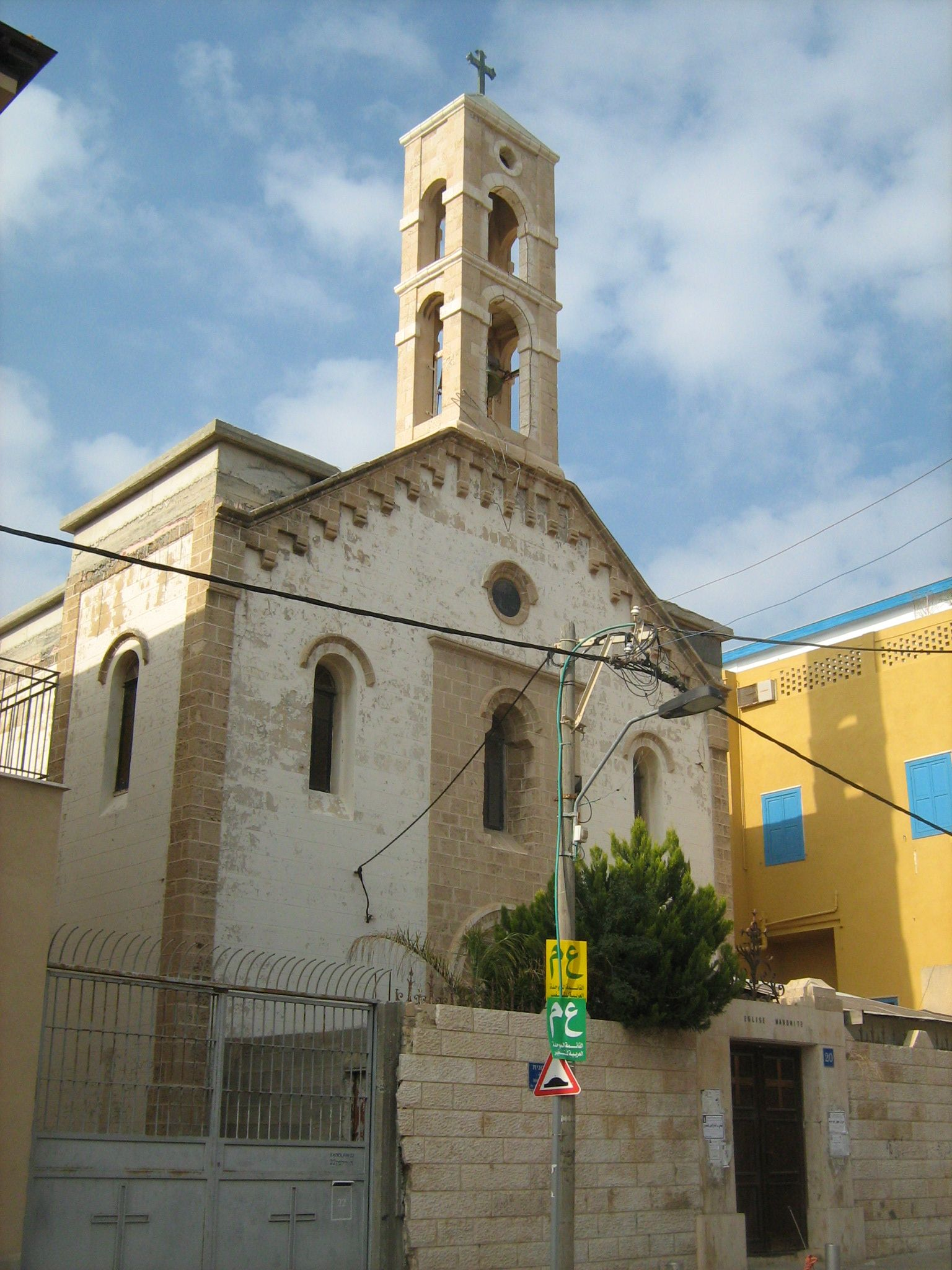 הכנסייה המרונית ביפו